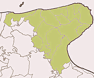 Suddivisione comunale del gargano